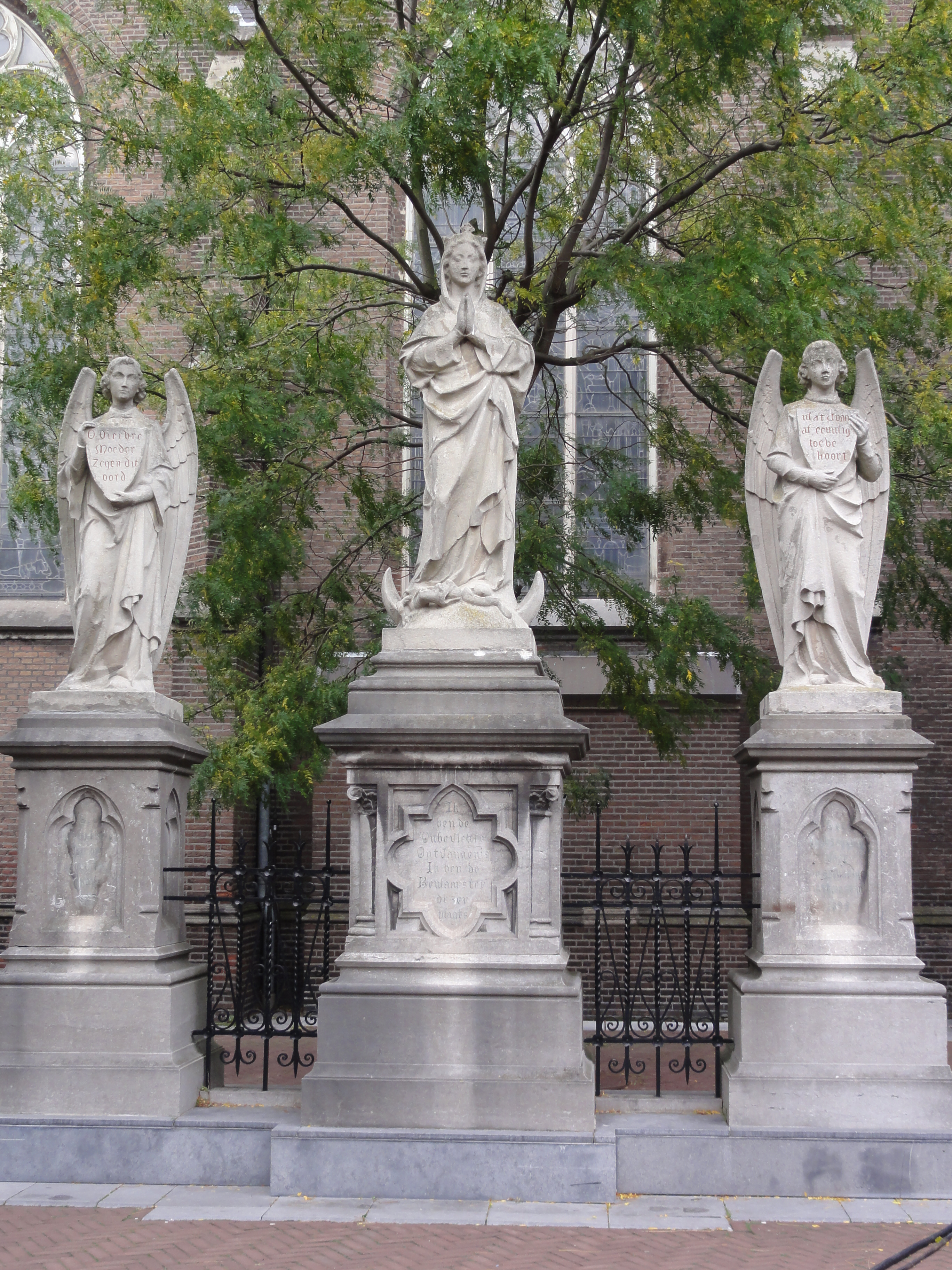 Oss Rijksmonument 516603 Mariabeeld met twee engelen naast de Grote Kerk 17″ N, 5° 31′ 19.68″ E Object location51° 46′ 10.37″ N, 5° 31′ 20.8″ E